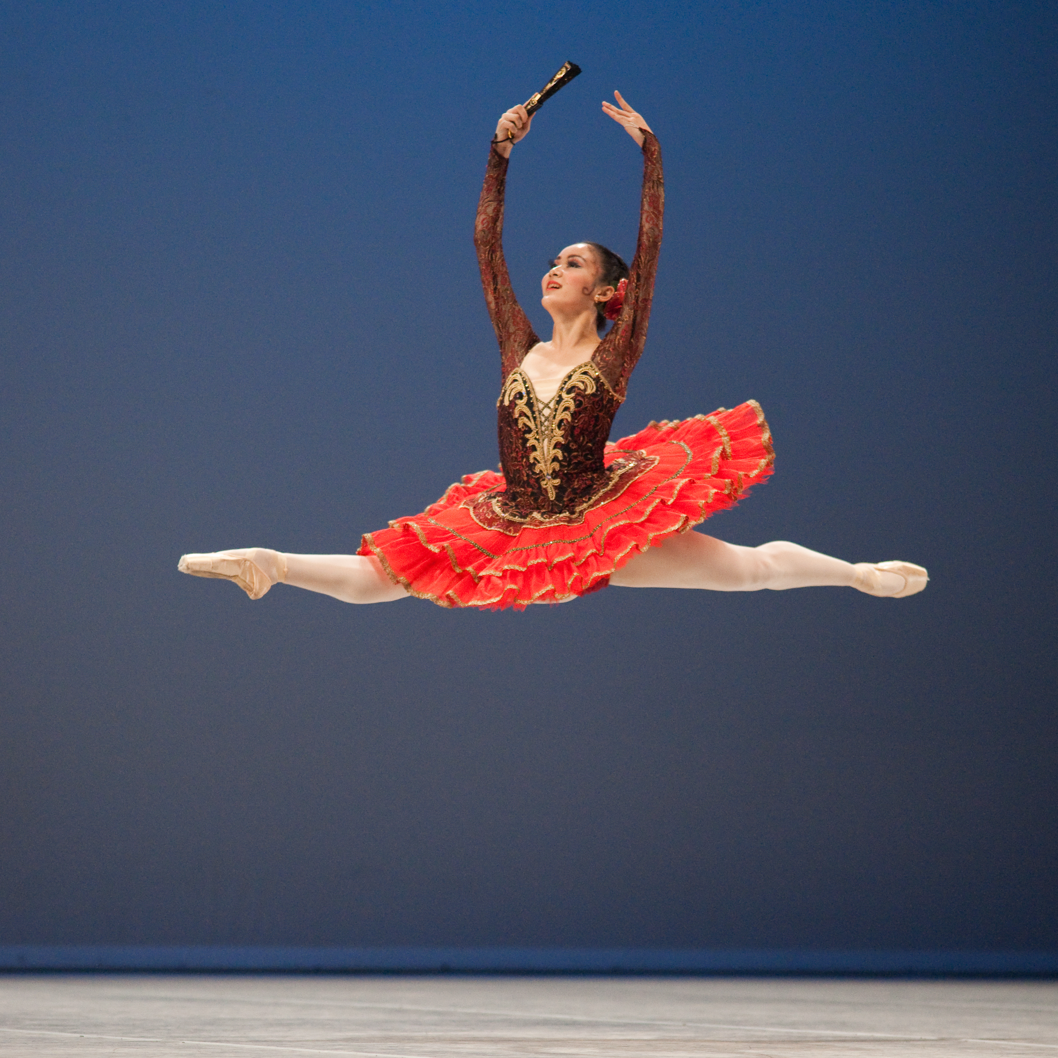 Variation extraite de Don Quichotte au Prix de Lausanne 2010. The making of this document was supported by Wikimedia CH. (Submit your project!) For all the files concerned, please see the category Supported by Wikimedia CH.